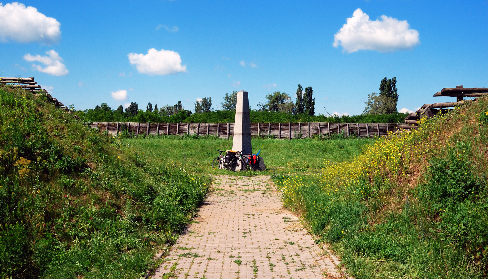 обеліски на місці редутів (10) (Поле Полтавської битви), Полтава, північно-західна околиця, Поле Полтавської битви